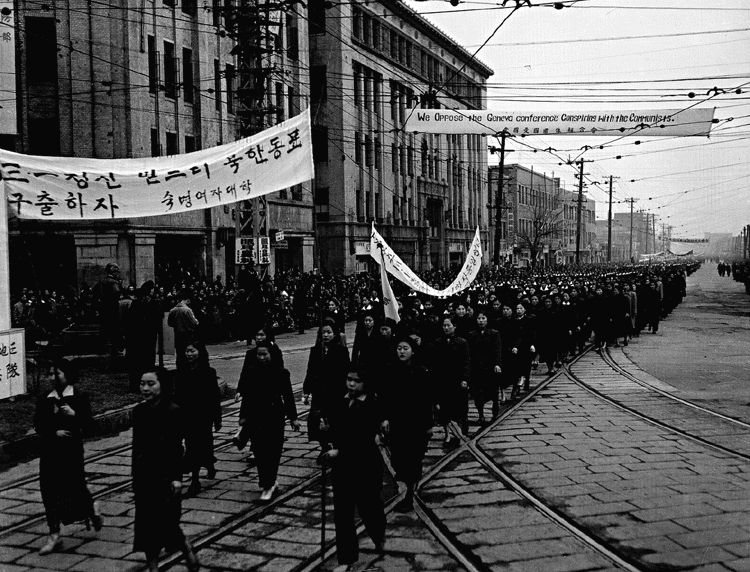 촬영일 : 1954년 03월 01일 촬영장소 : 대한민국 서울 서울 참석자 : 미상 관련내용 : 제35회 3.1절 시가행렬에는 숙명여자대학생들도 참가하였다.